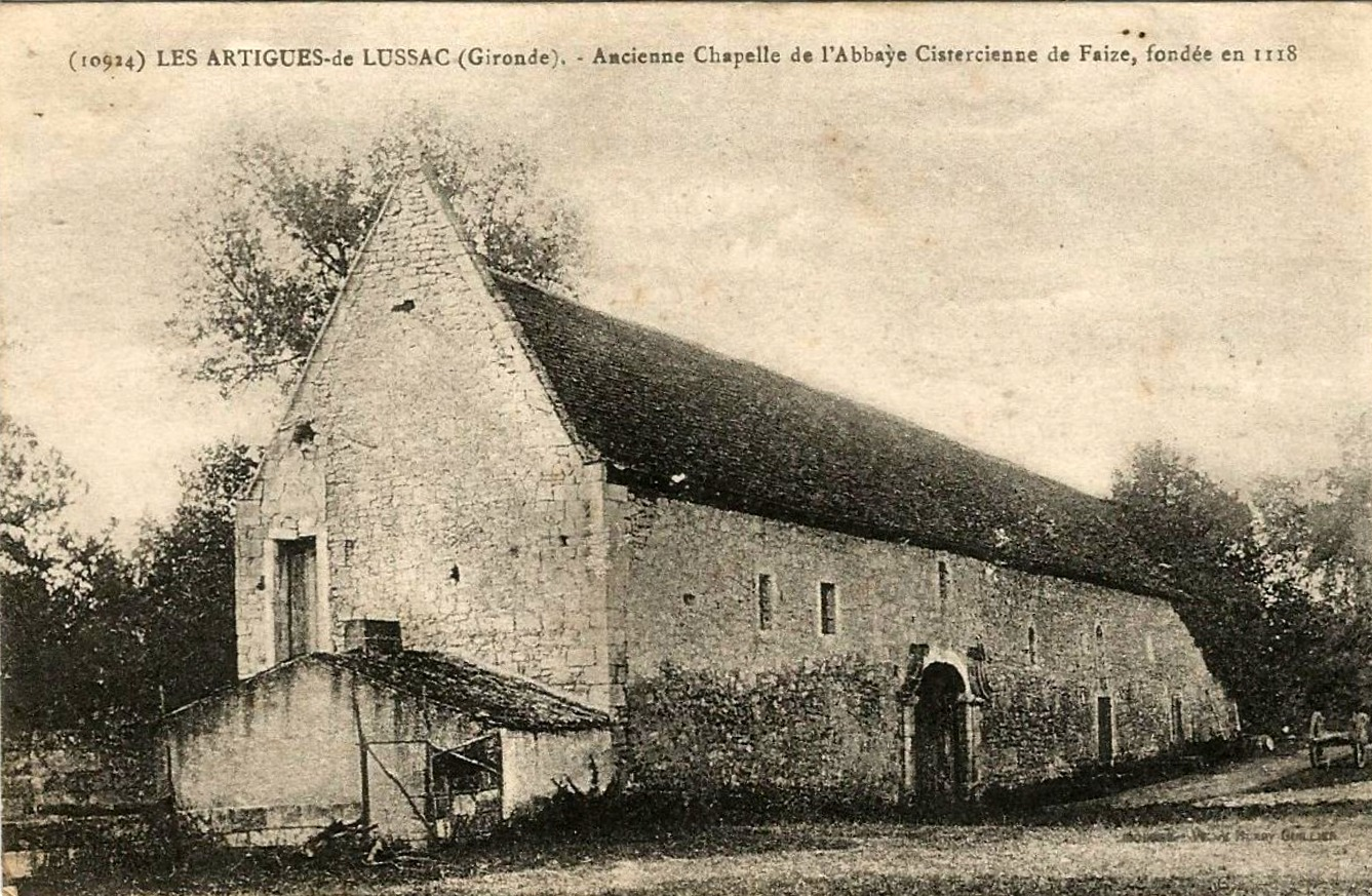 Artigues de Lussac on post-cards